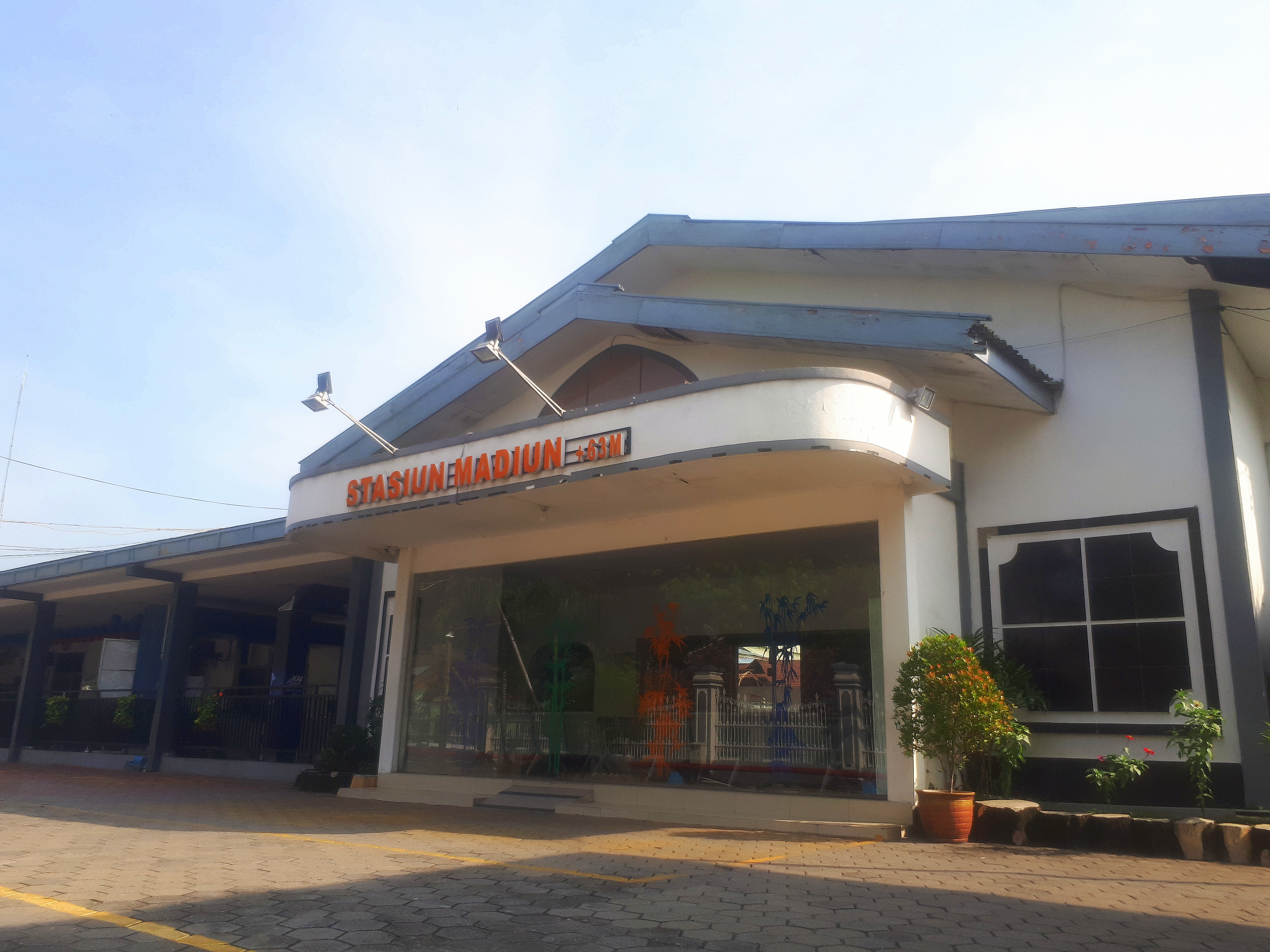 Tampak depan Stasiun Madiun, 2020